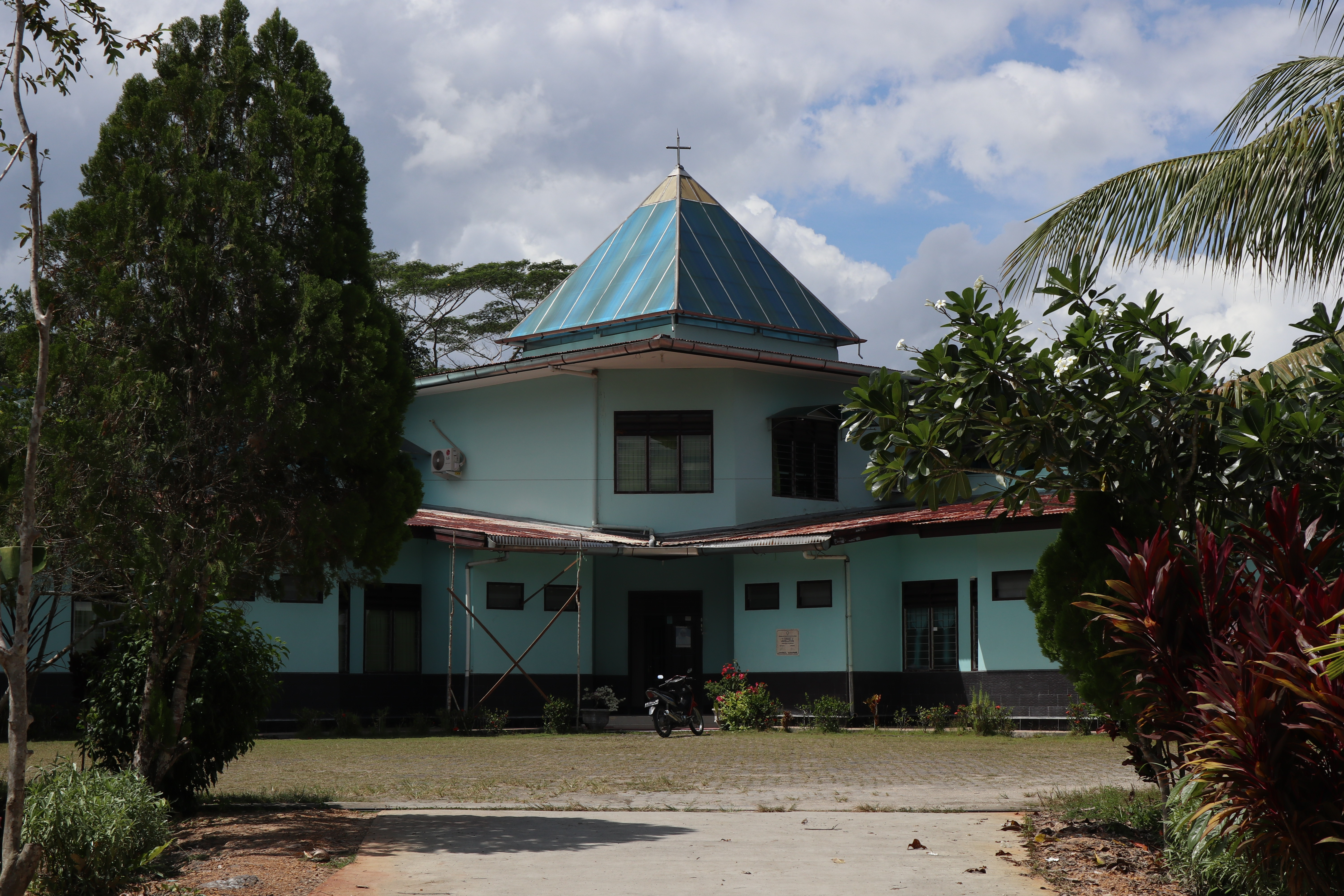 Gedung Keuskupan Tanjung Selor.